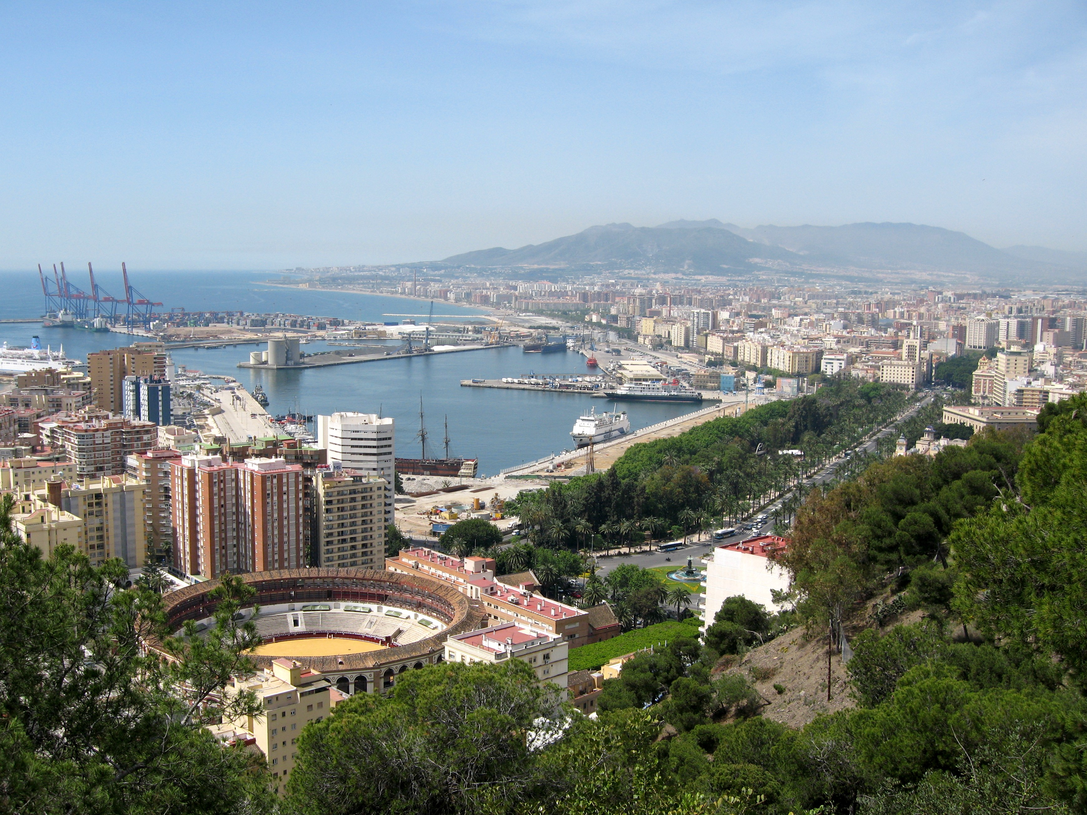 Hafen von Málaga, Andalusien, Spanien